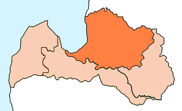 Mappa dell'arcidiocesi cattolica di Riga, in Lettonia. Opera personale. Fonte per i confini delle diocesi